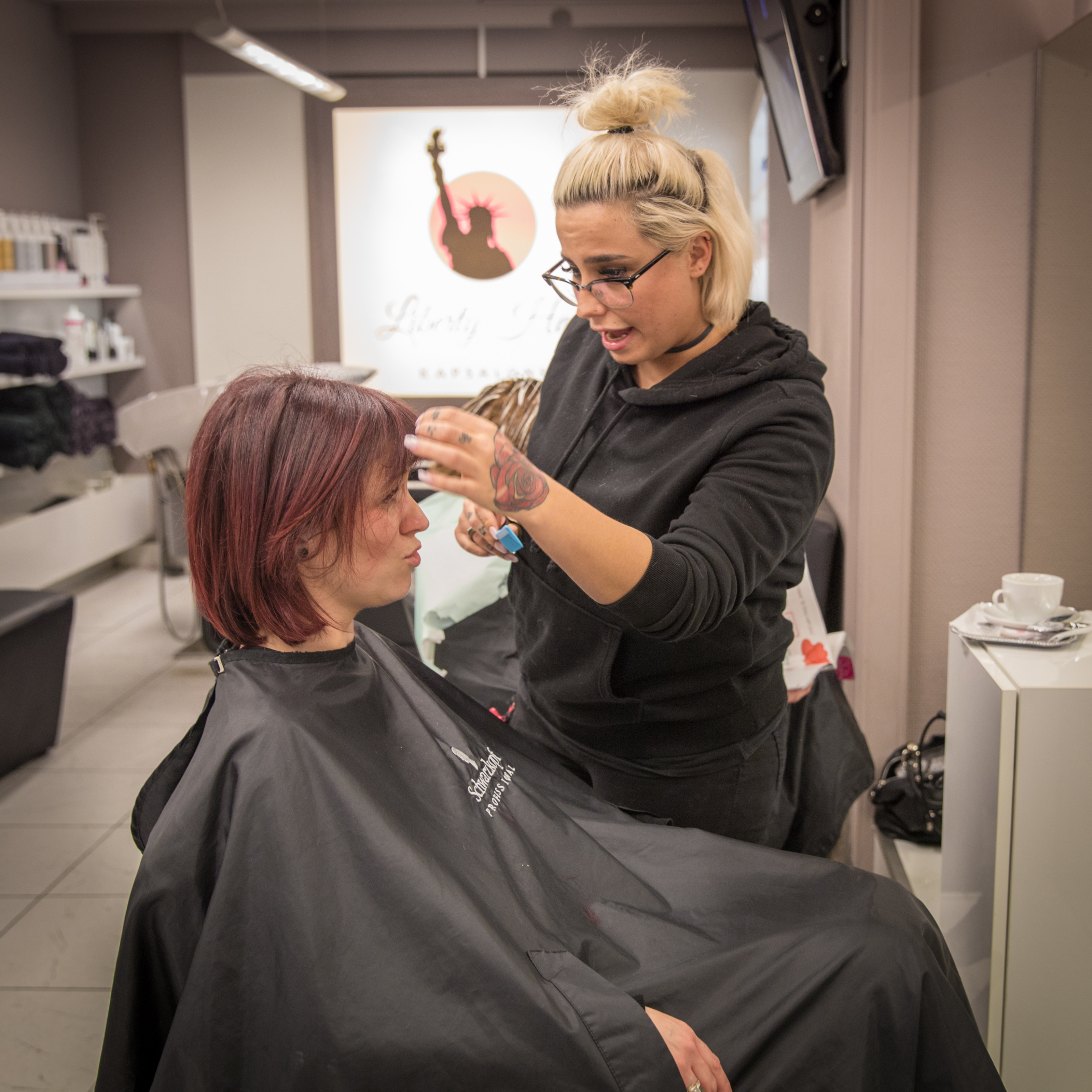 Smalltalk bij de kapper, Leuven, 2018